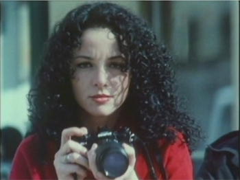 שוש מרציאנו - צלמת